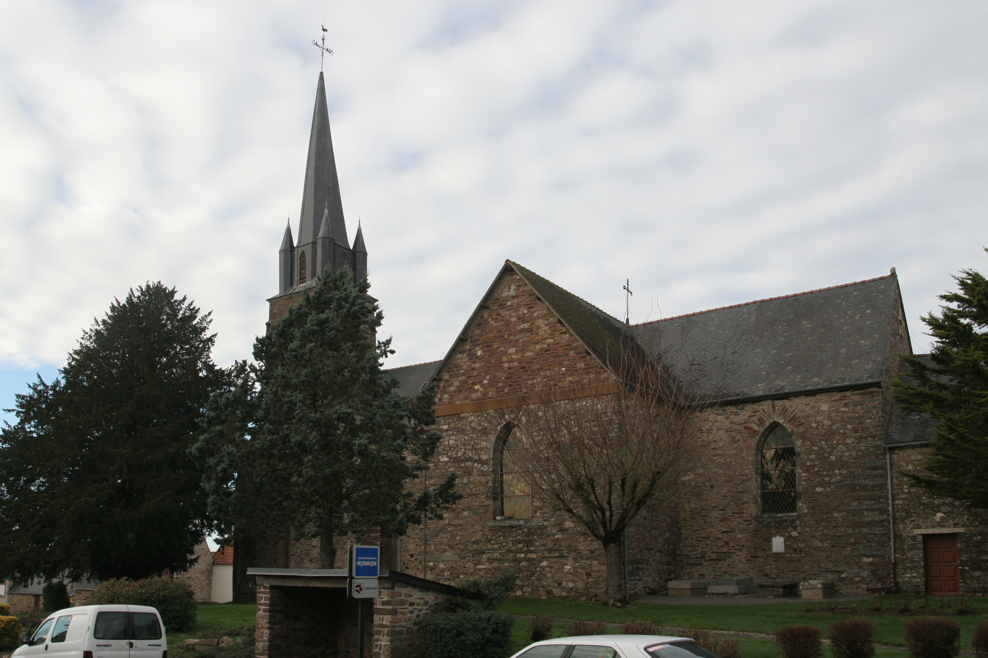 Église Saint-Éloi de Comblessac.